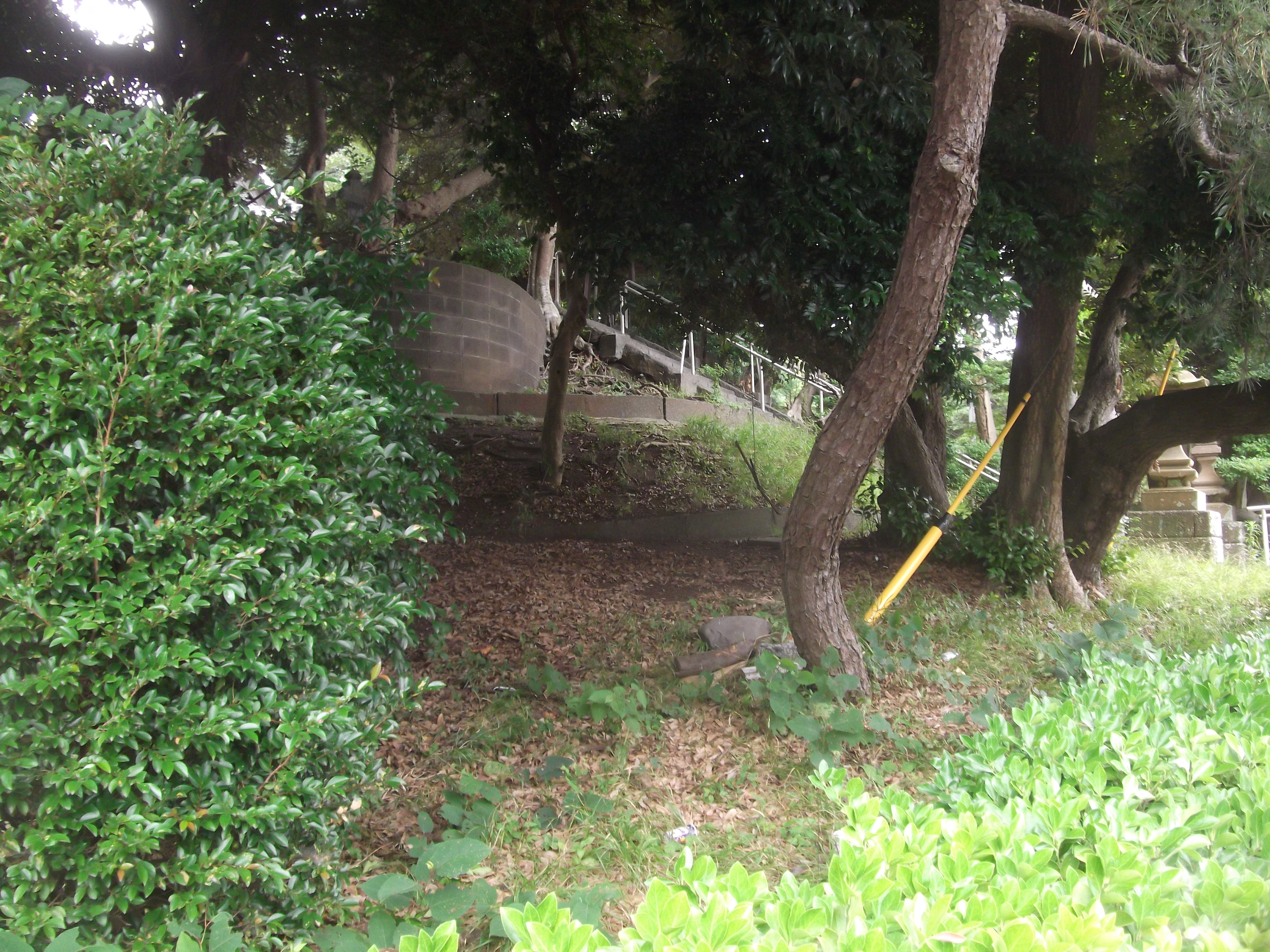 沼津市の神明塚古墳。後円部とコンクリートの擁壁